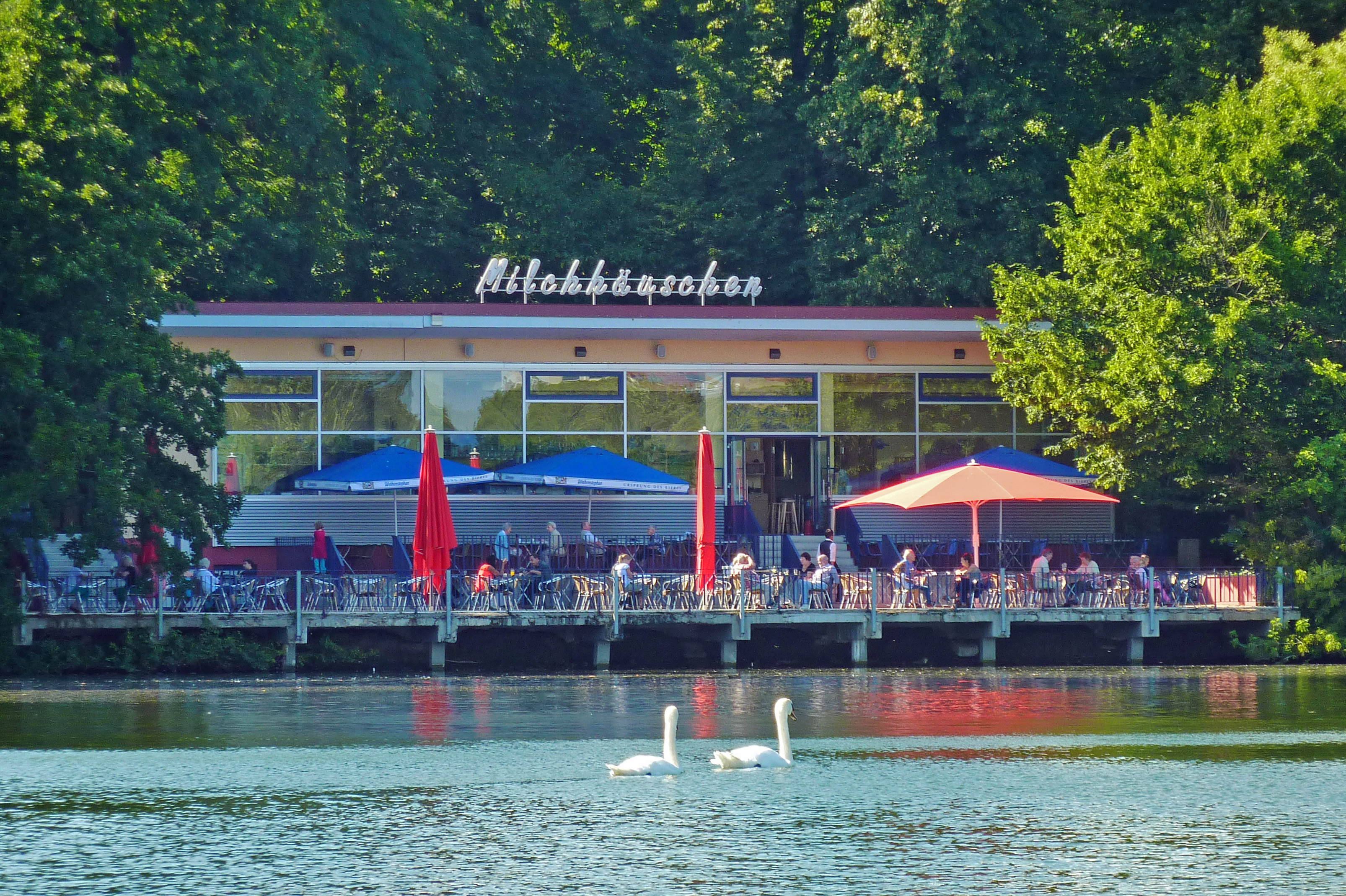 Café Milchhäuschen am Weißen See in Berlin-Weißensee. Sicht vom See aus.